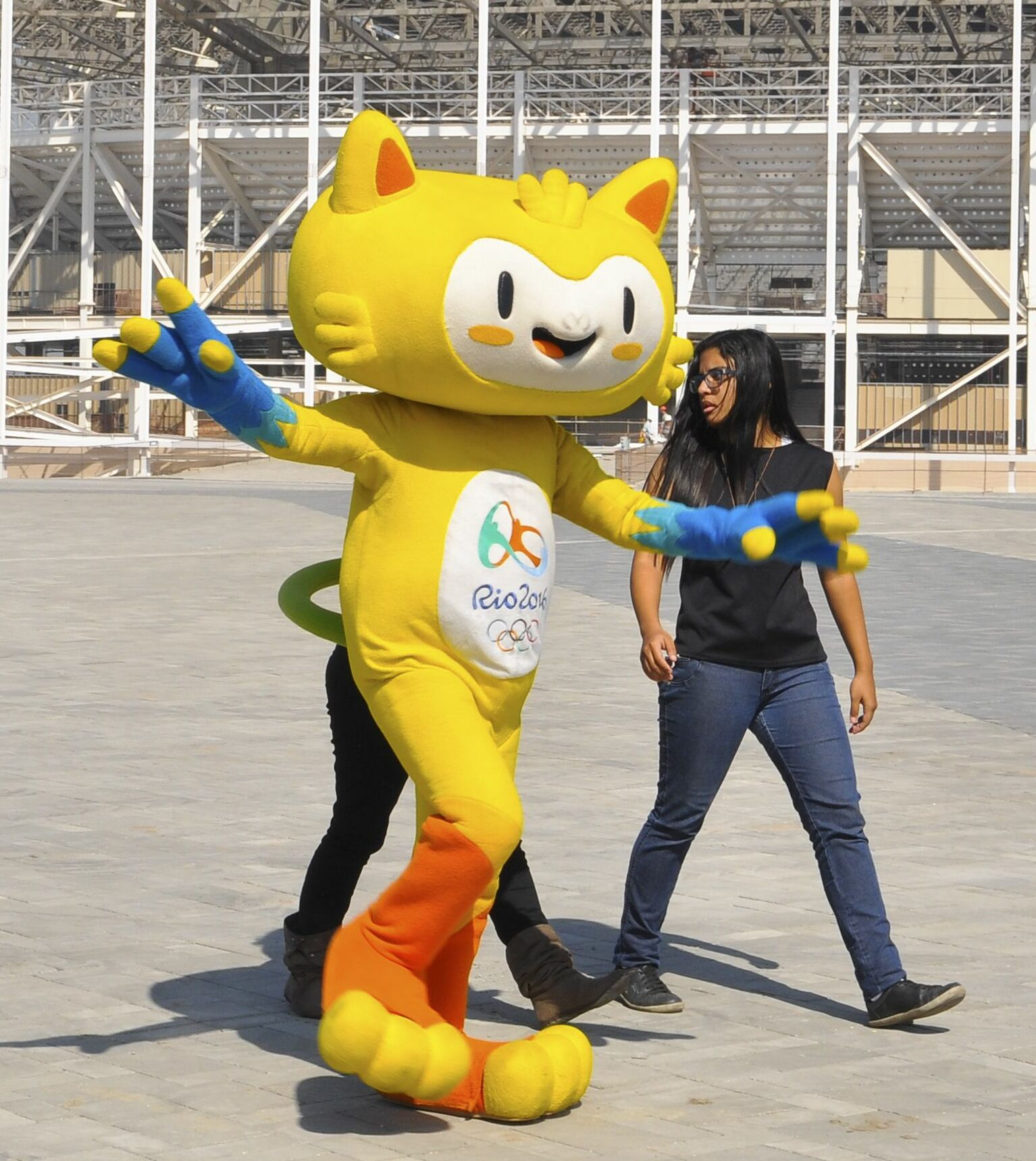 Visita do mascote dos Jogos Olímpicos de 2016, Vinícius, ao Parque Olímpico da Barra da Tijuca, a um ano da competição.